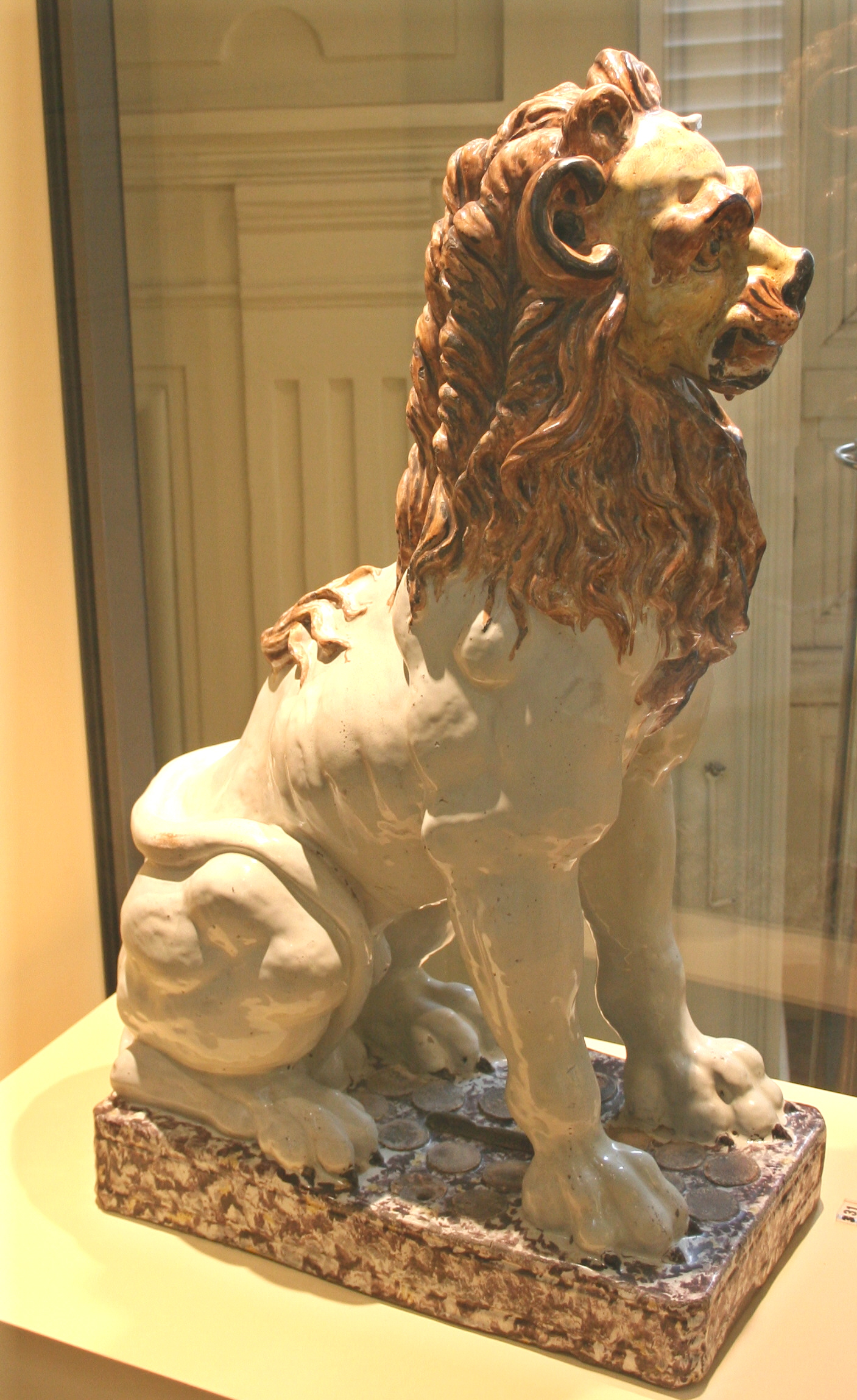 Musée de la faïence à Marseille, lion assis des ateliers Joseph Fauchier à Marseille, début du XIXème siècle, décor grand feu polychrome, hauteur=80cm.